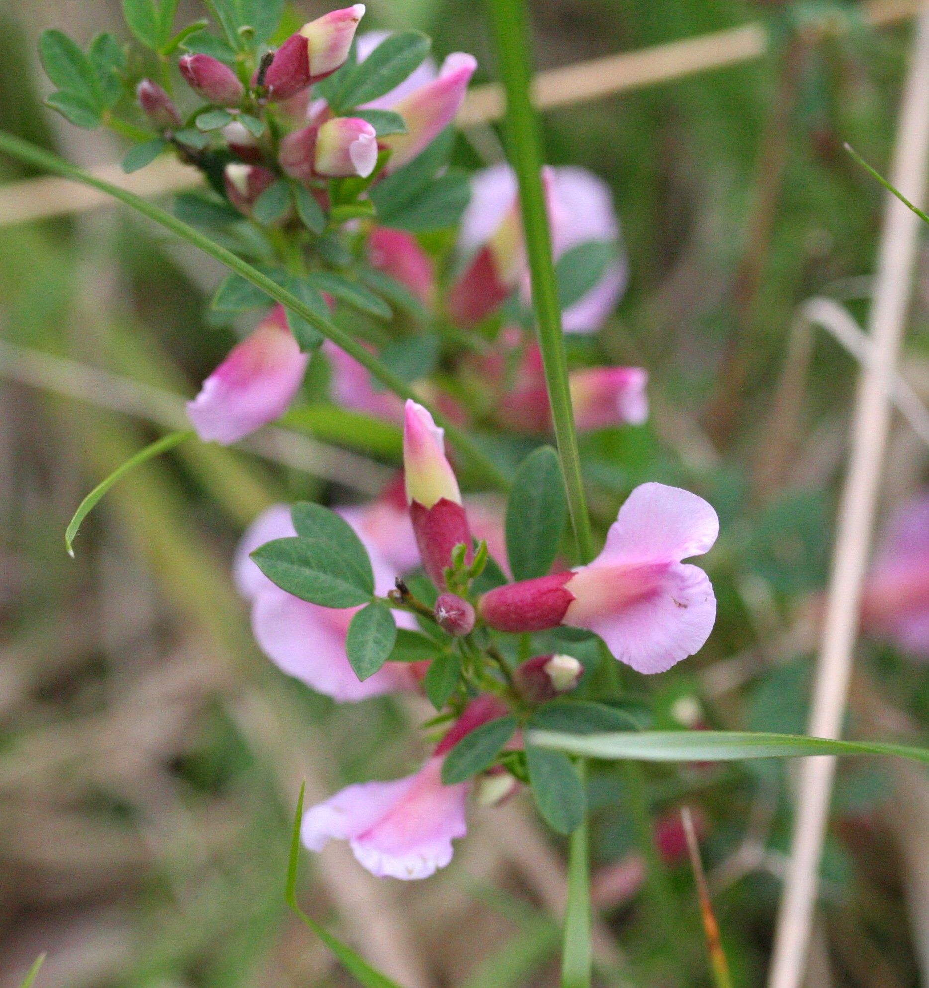 Chamaecytisus_purpureus (Citiso purpureo) Località Val Piana, Limana (BL), quota 850